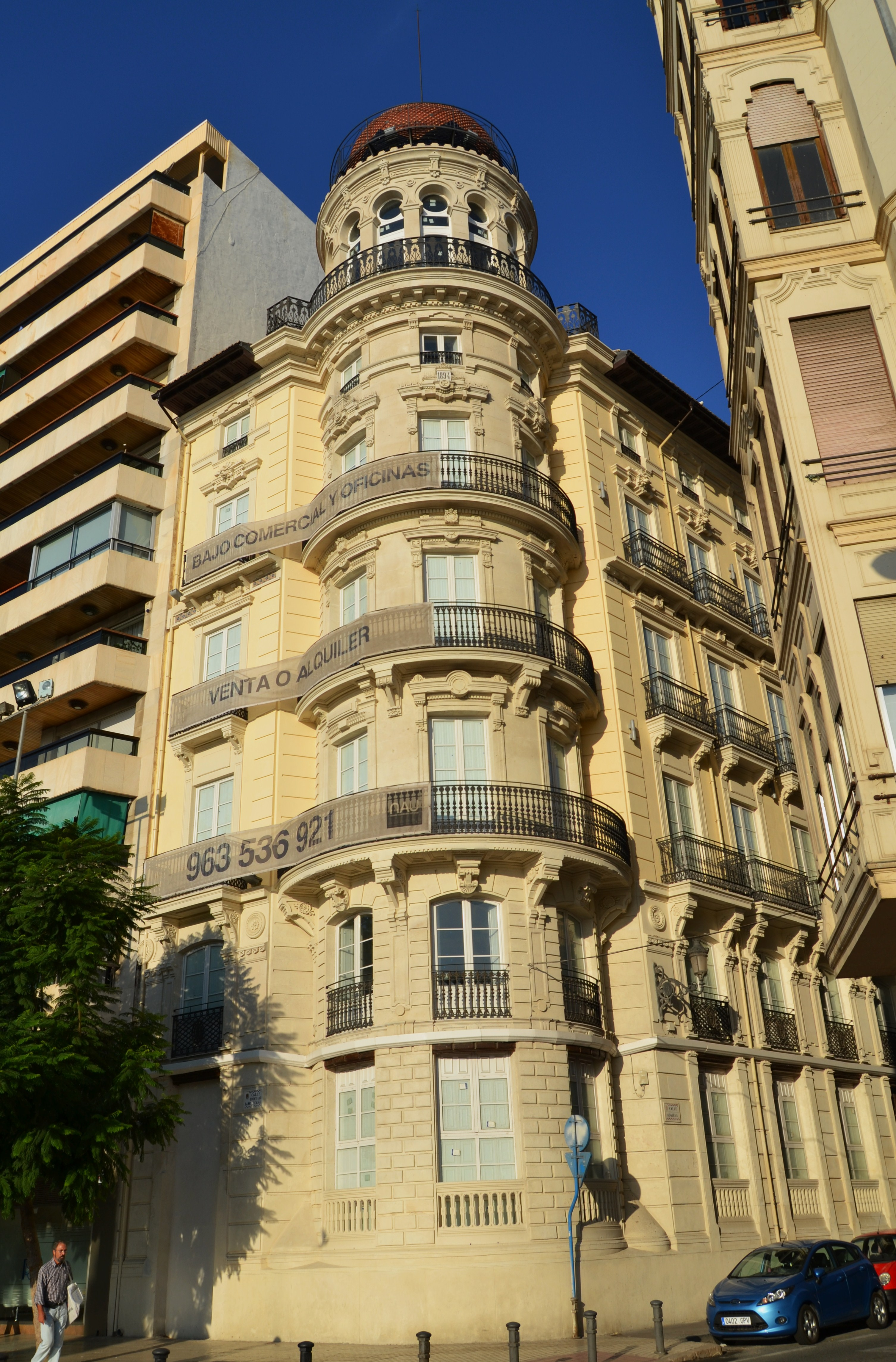 Casa Alberola, Alacant.